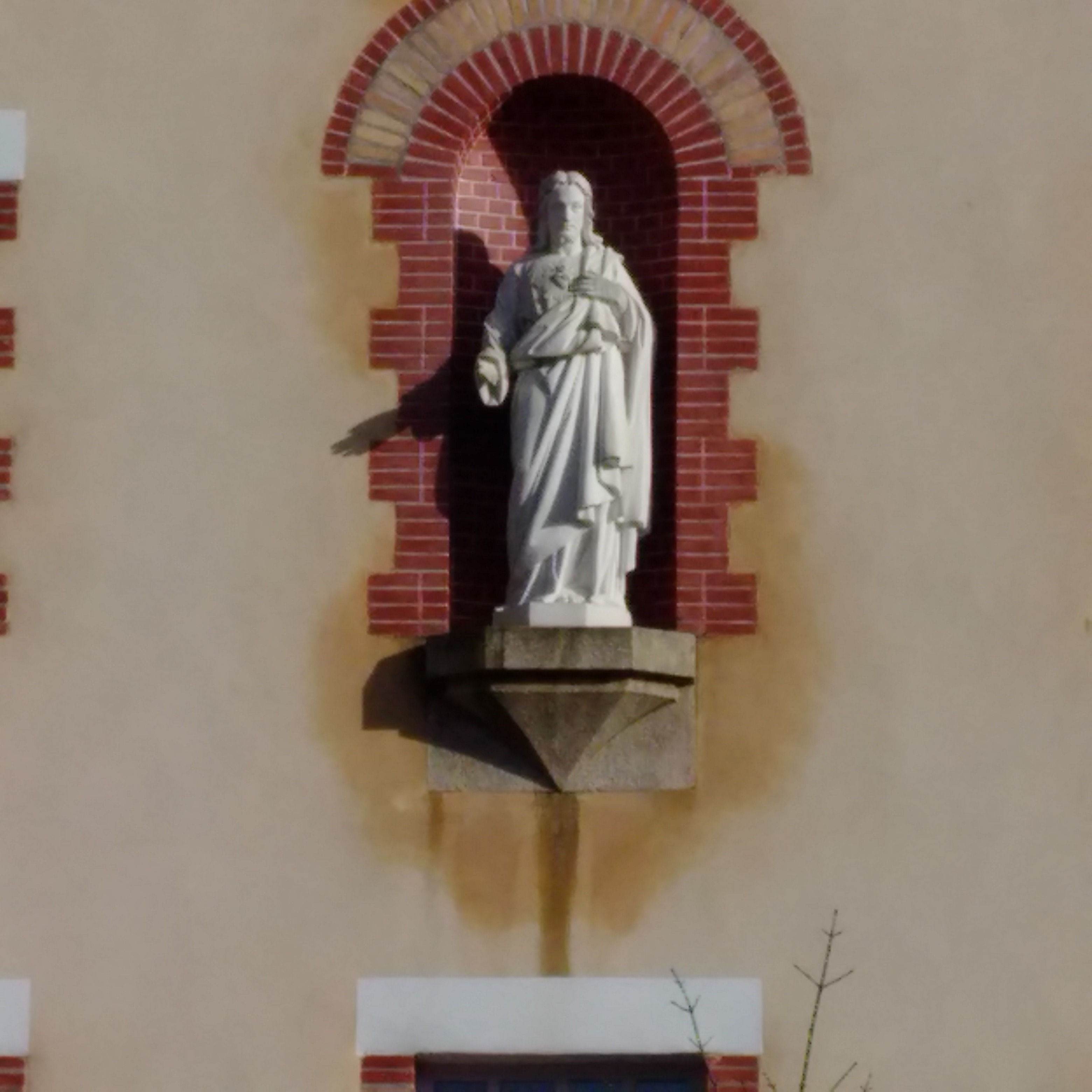 Delwenn ar werc'hezh Vari Skolaj ar C'hleuz e Redon. Skolaj diouliet gant Yann-Vari De La Mennais